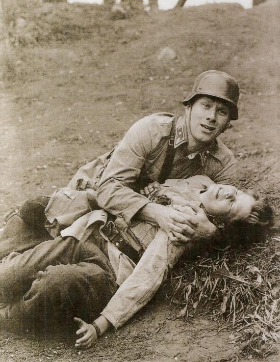 Suomalainen näyttelijä Heikki Heino (1926-2003) Väinö Linnan kirjan "Tuntematon sotilas" vänrikki Kariluotona Pyynikin kesäteatterissa kesällä 1962.